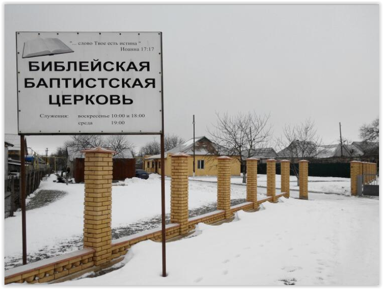 ББЦ Раздельная